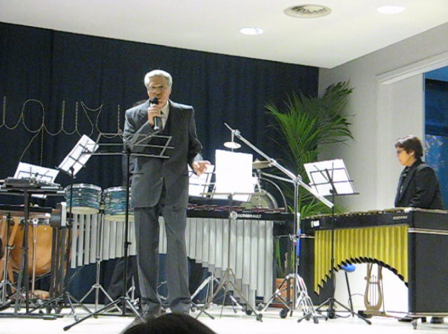 Antonio Buonomo illustra la sua elaborazione della “Leggenda Valacca”